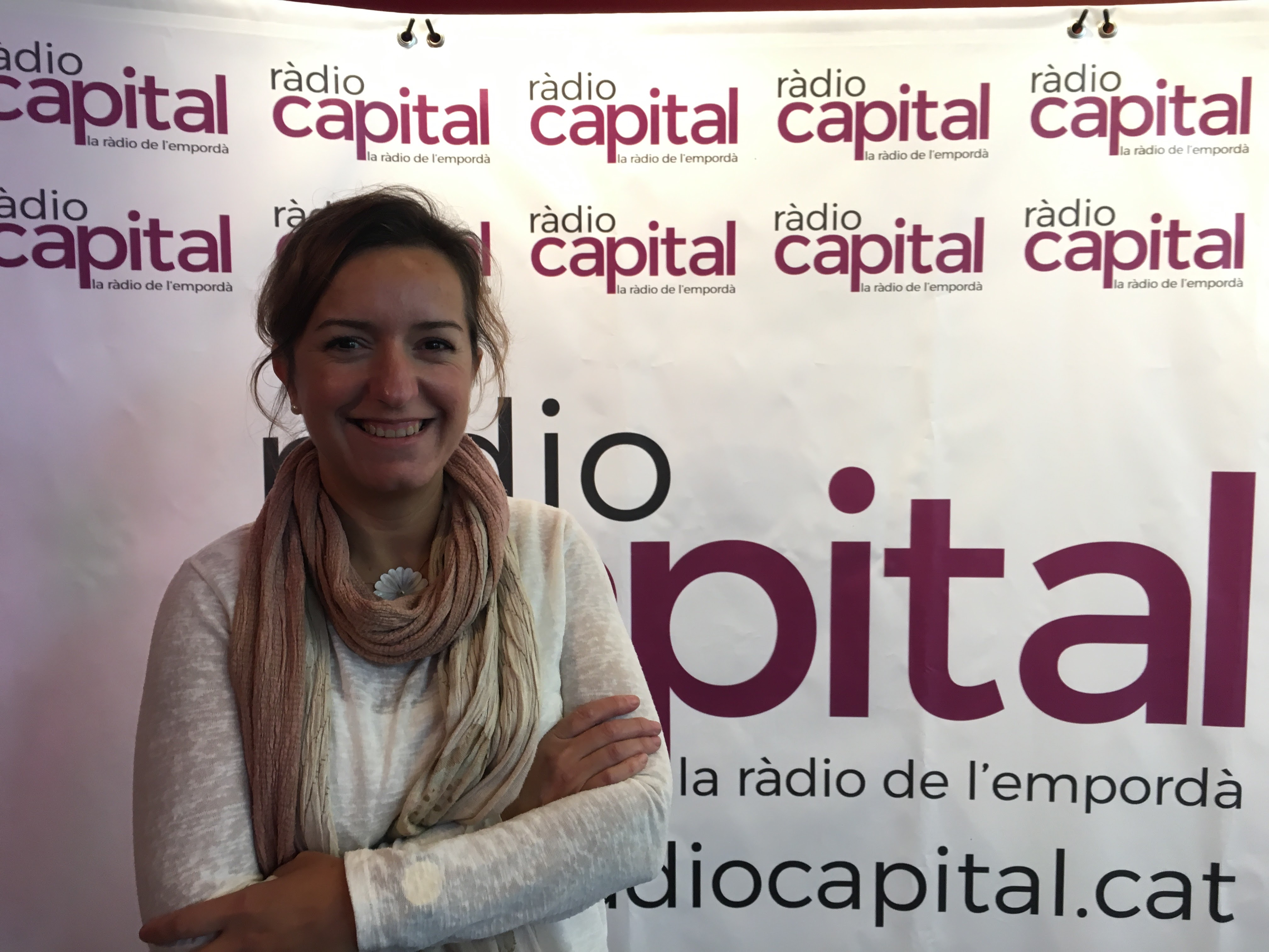 Programa especial Ràdio Capital 15 anys: Cultura · Territori · Ràdio, emès en directe des del Teatre Municipal de Palafrugell